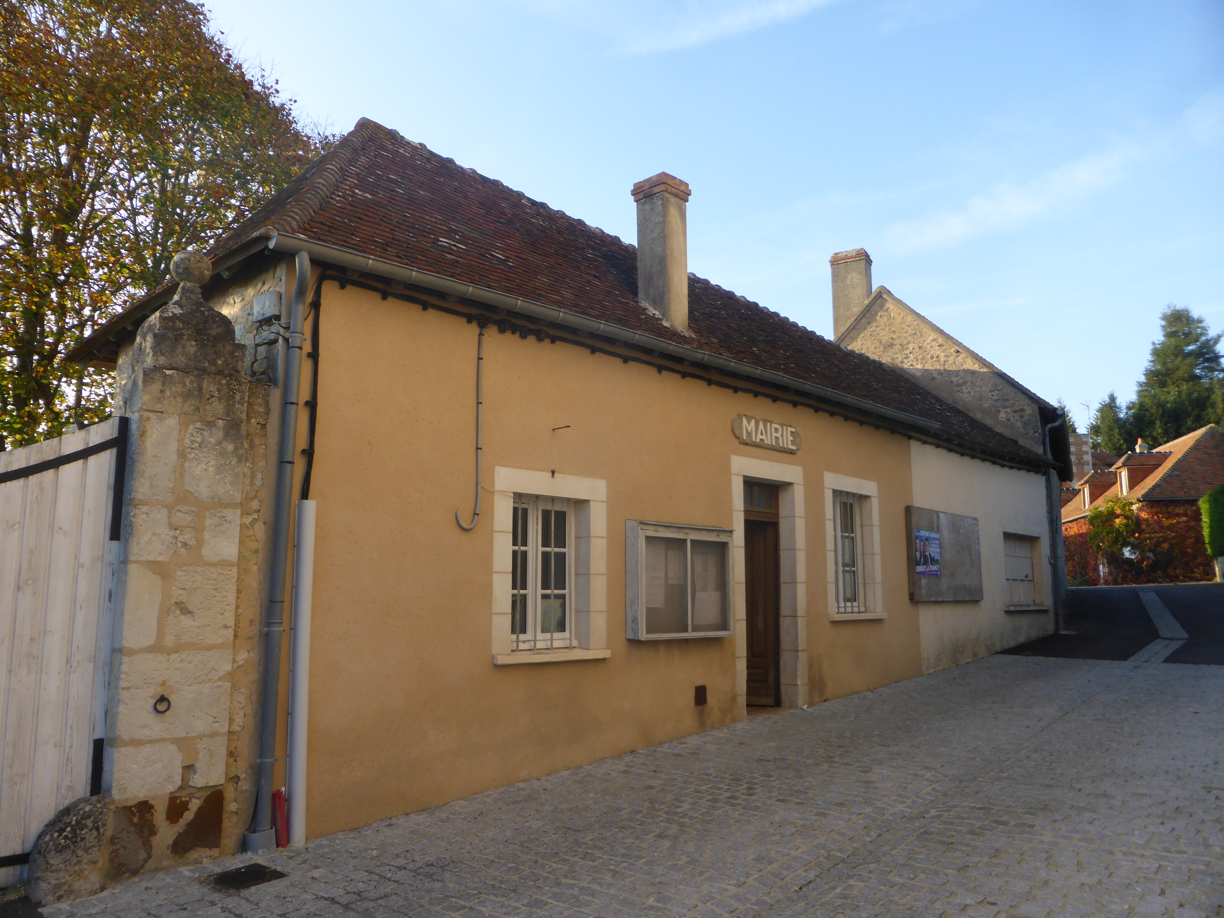 Mairie de Montgaudry, dans l'Orne.